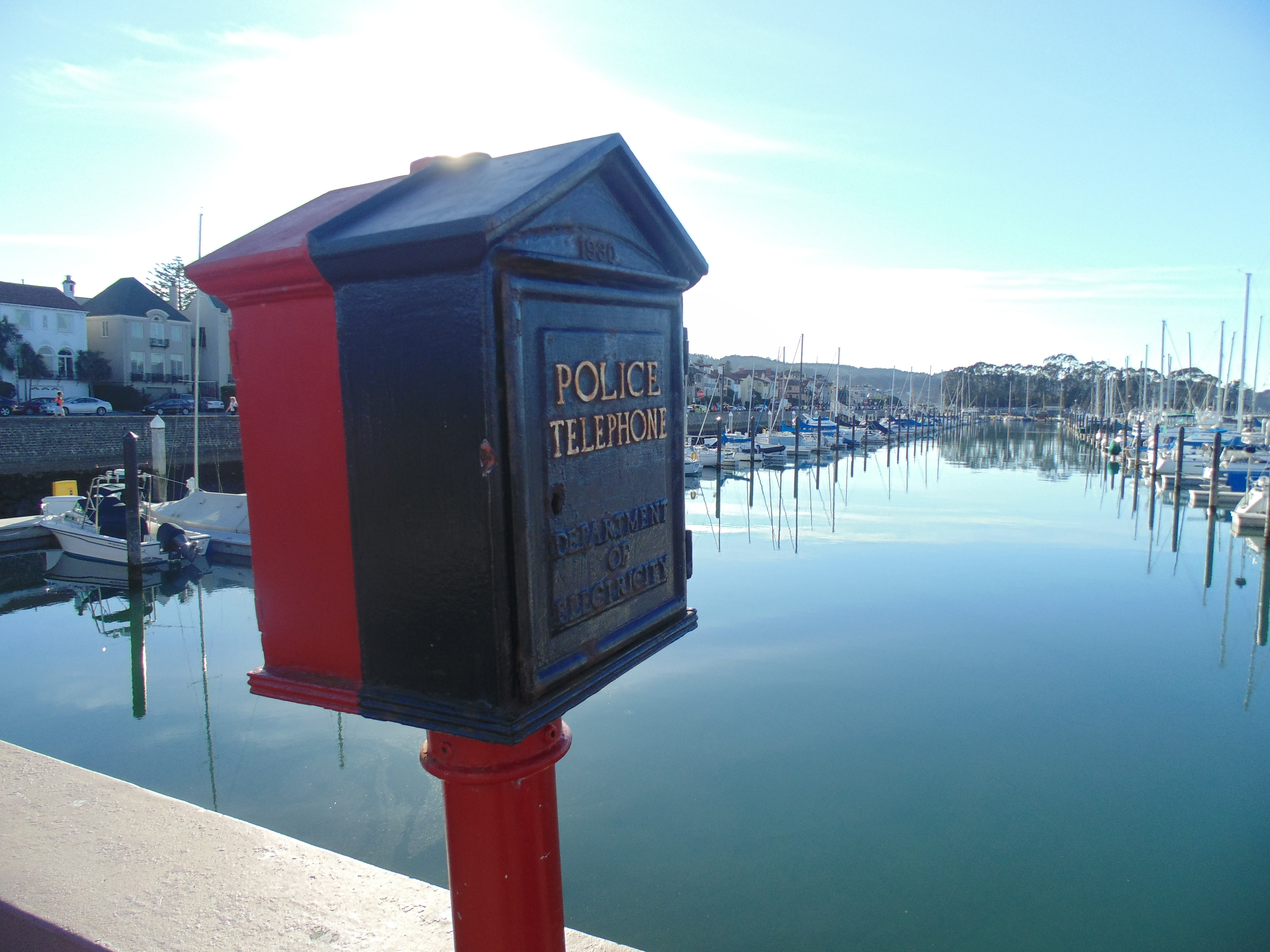 Puerto de San Francisco.